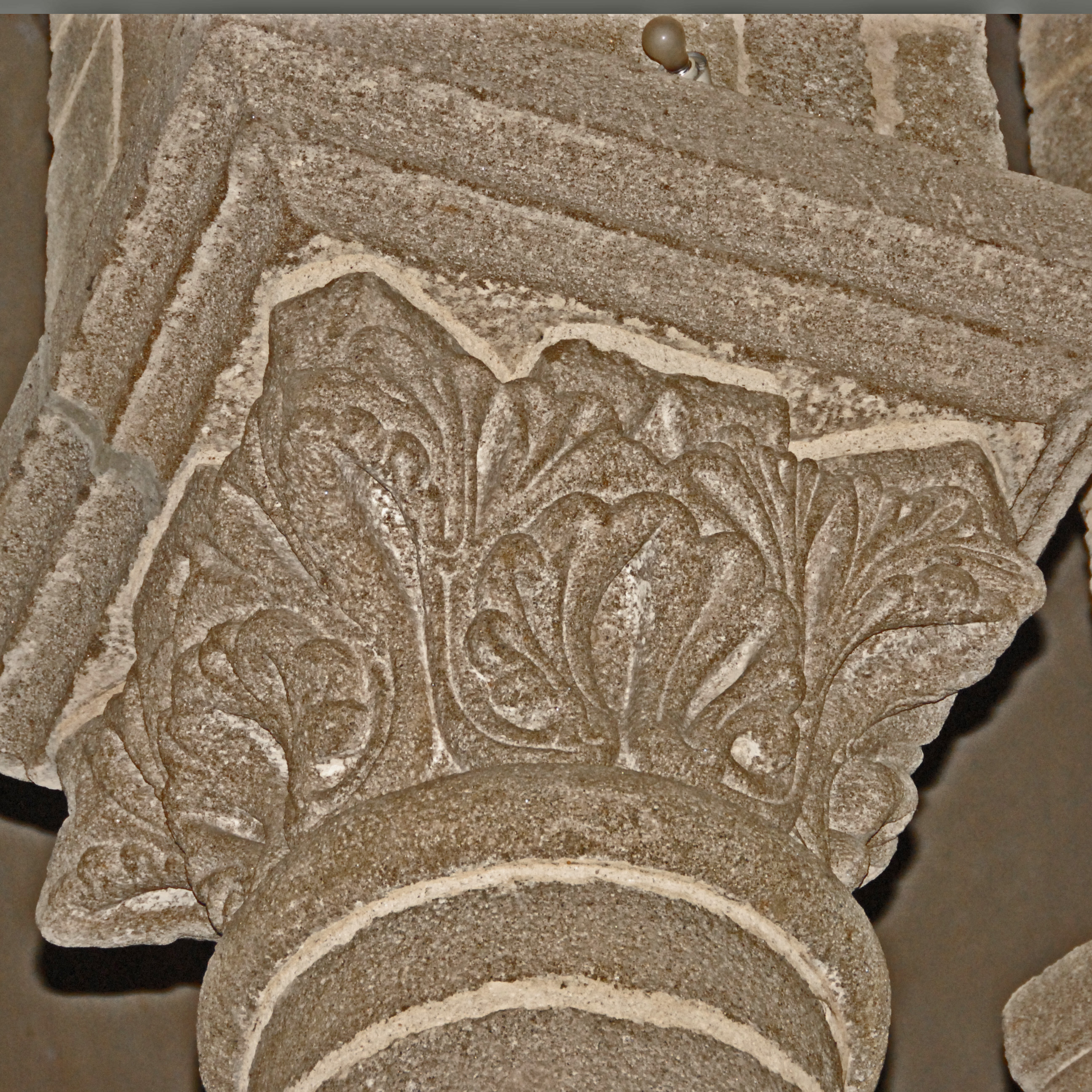 St-Pierre de Le Dorat, Chorkapitell, pflanzliche Skulptur